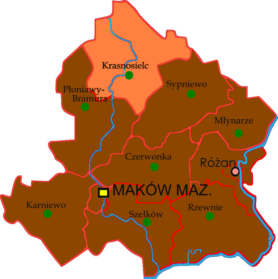 Gmina Krasnosielc w powiecie makowskim